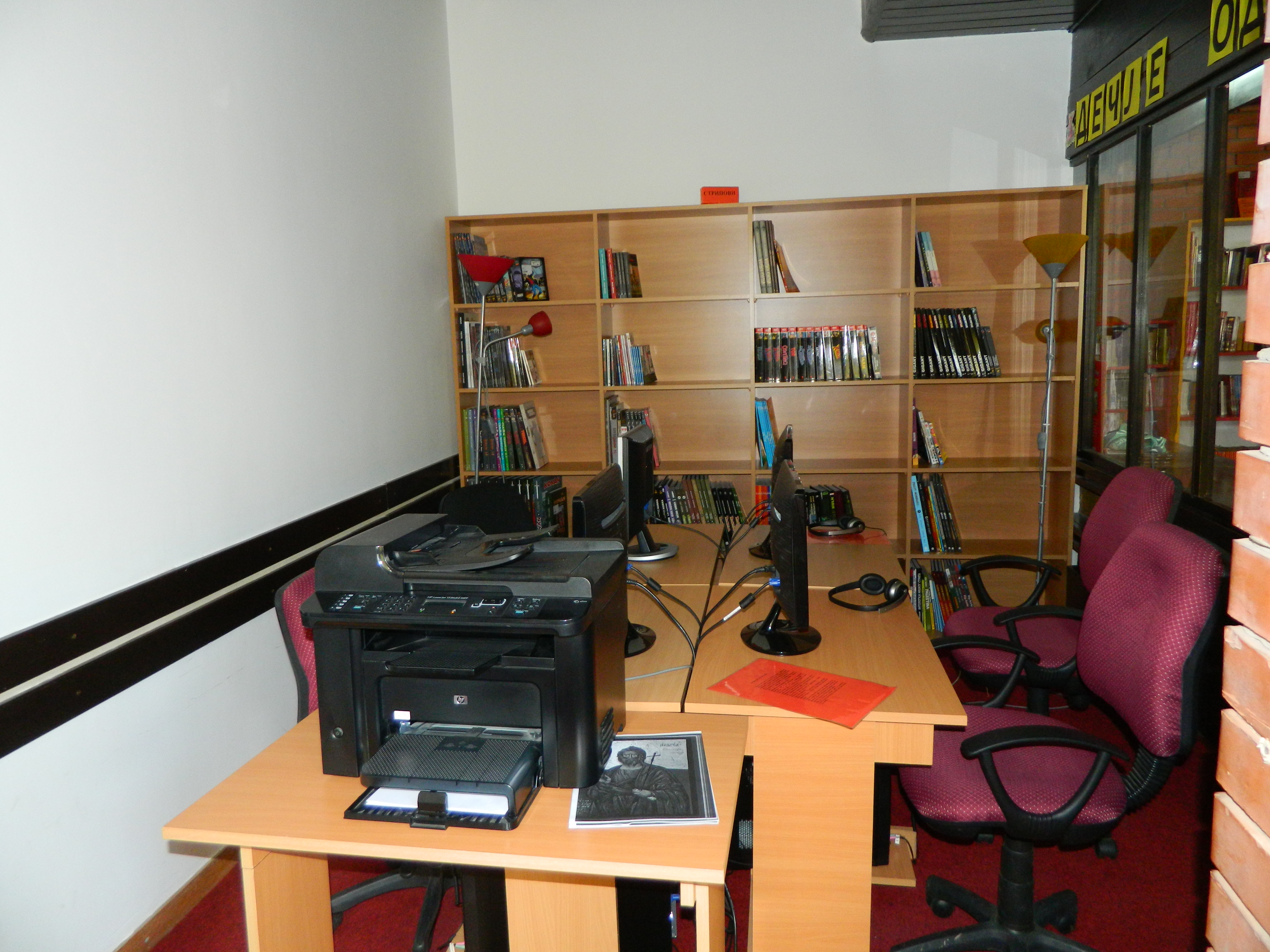 Narodna biblioteka Pirot. Dečije odeljenje.